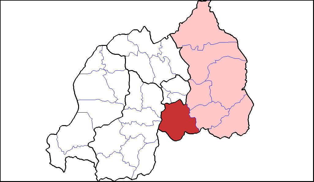 Distretto di Bugesera.